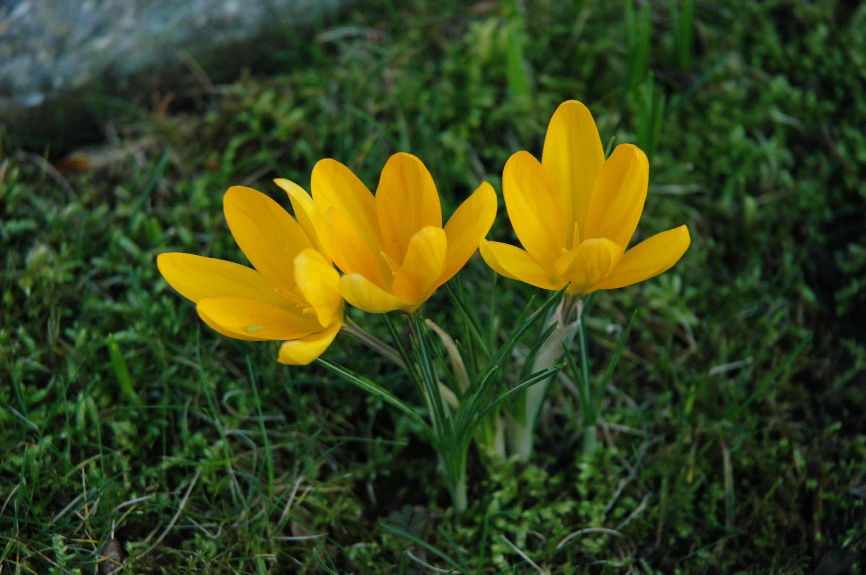 Gele krokusjes; (en) Yellow flowers